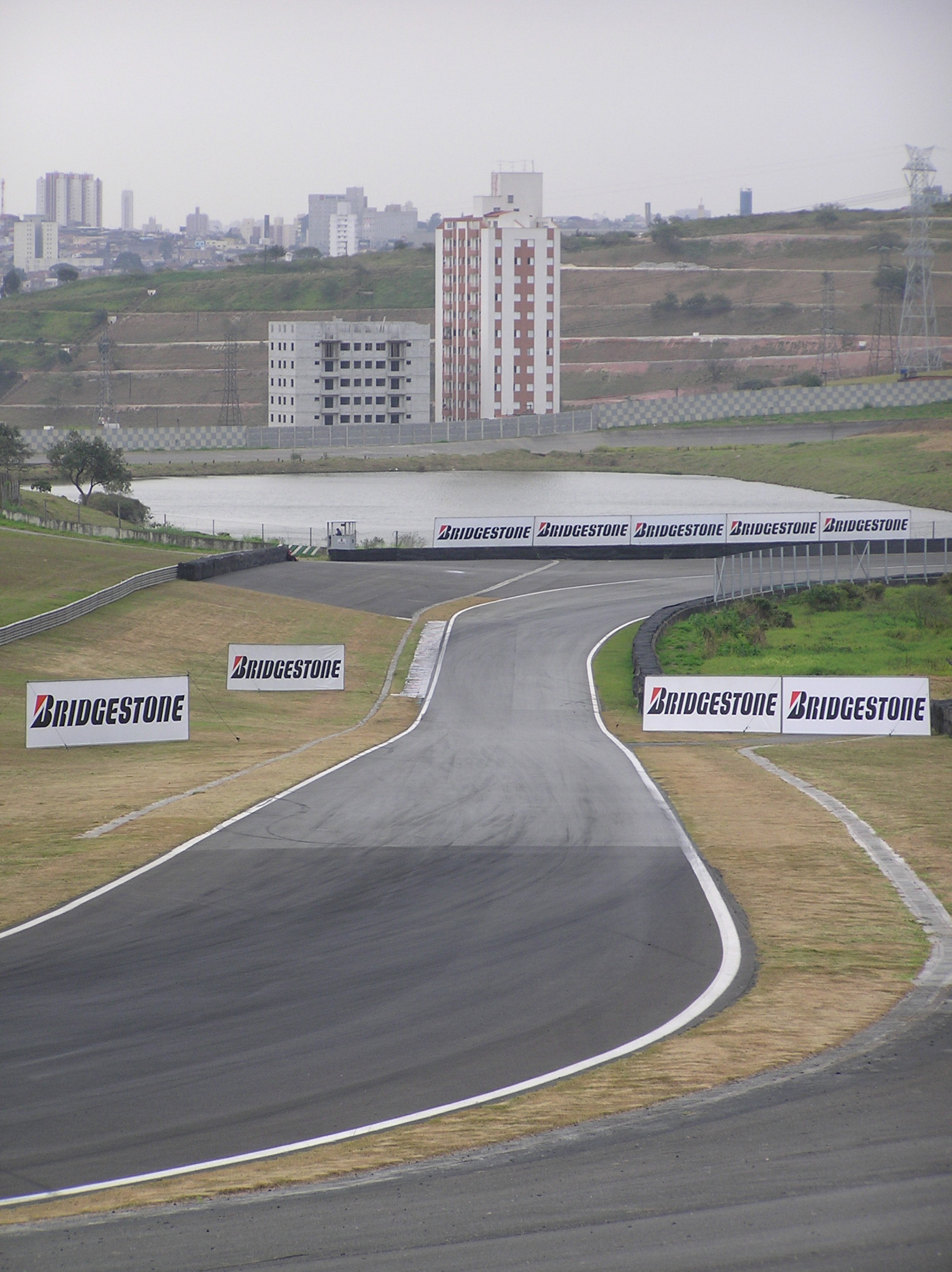 Autódromo José Carlos Pace: Ferradura